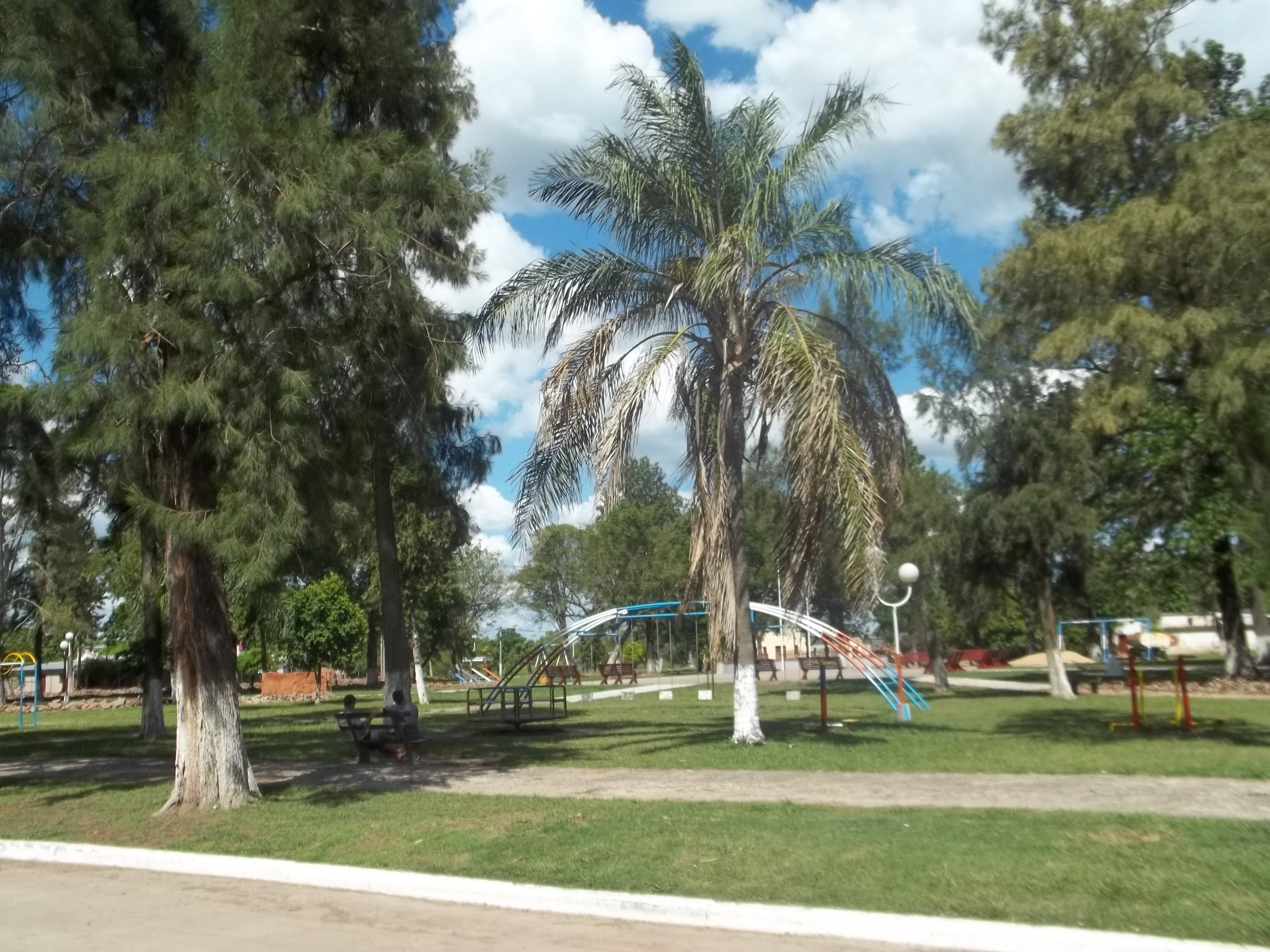 Plaza de Lapachito